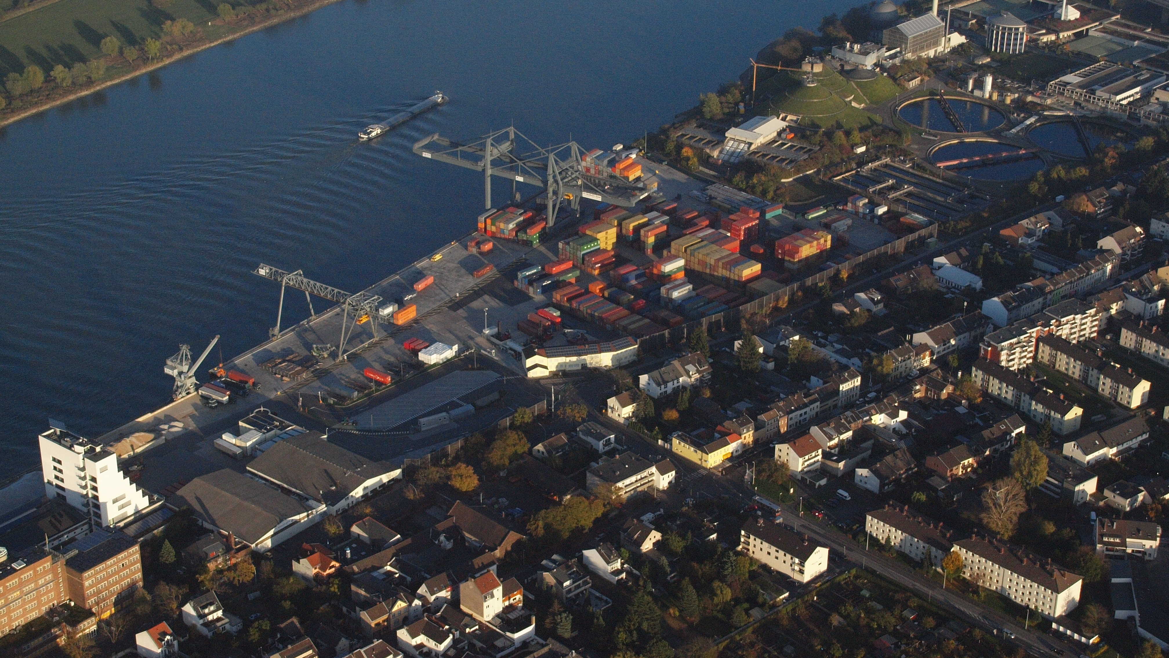 Der Bonner Hafen am westlichen Rheinufer: Luftaufnahme